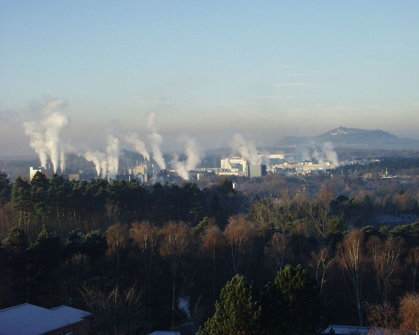 Stadtallendorf im Morgendunst. Industrie und ihre Schornsteine bestimmen das Bild der Stadt. Zu den größten Firmen gehören Süßwarenproduzent Ferrero und der Produzent für Bremsscheiben und Grauguss, Fritz Winter.